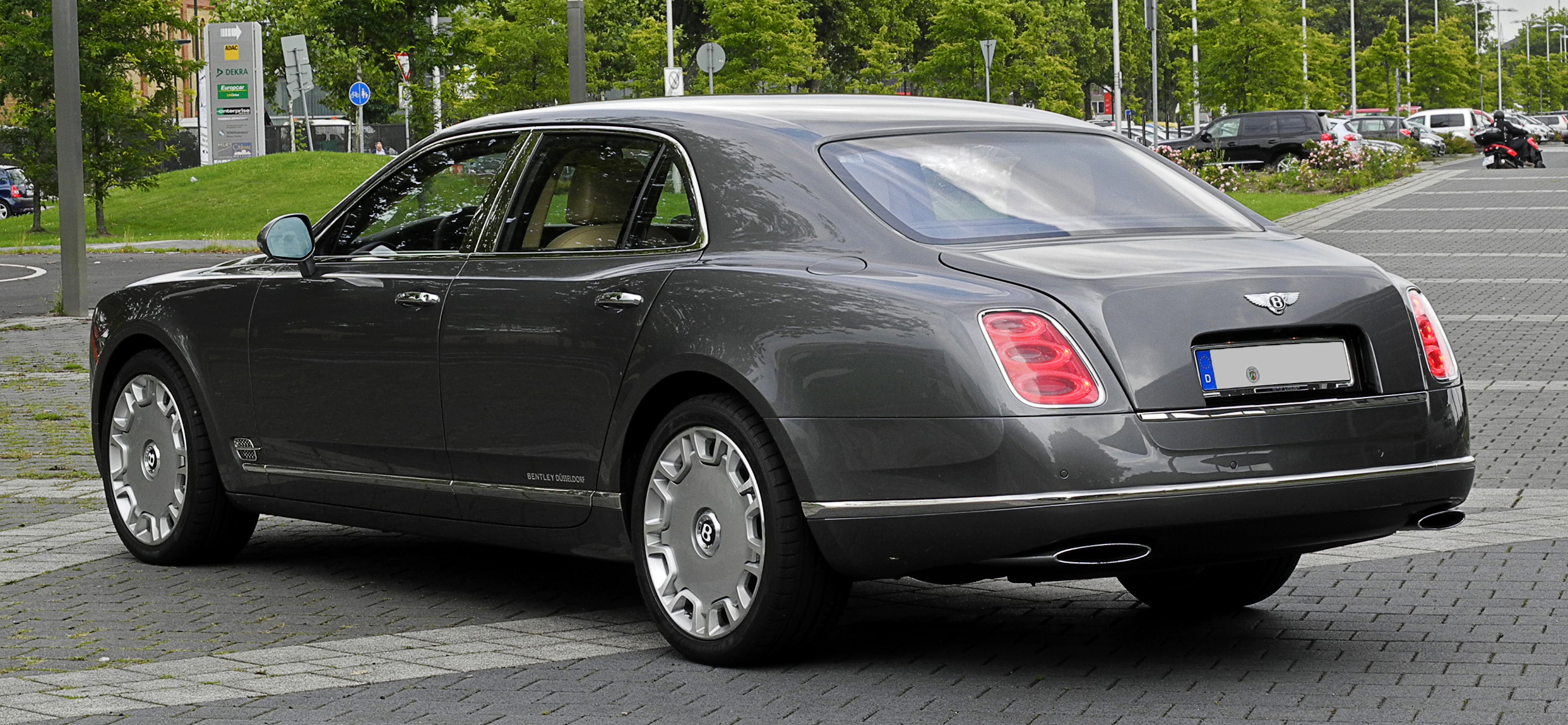 Bentley Mulsanne